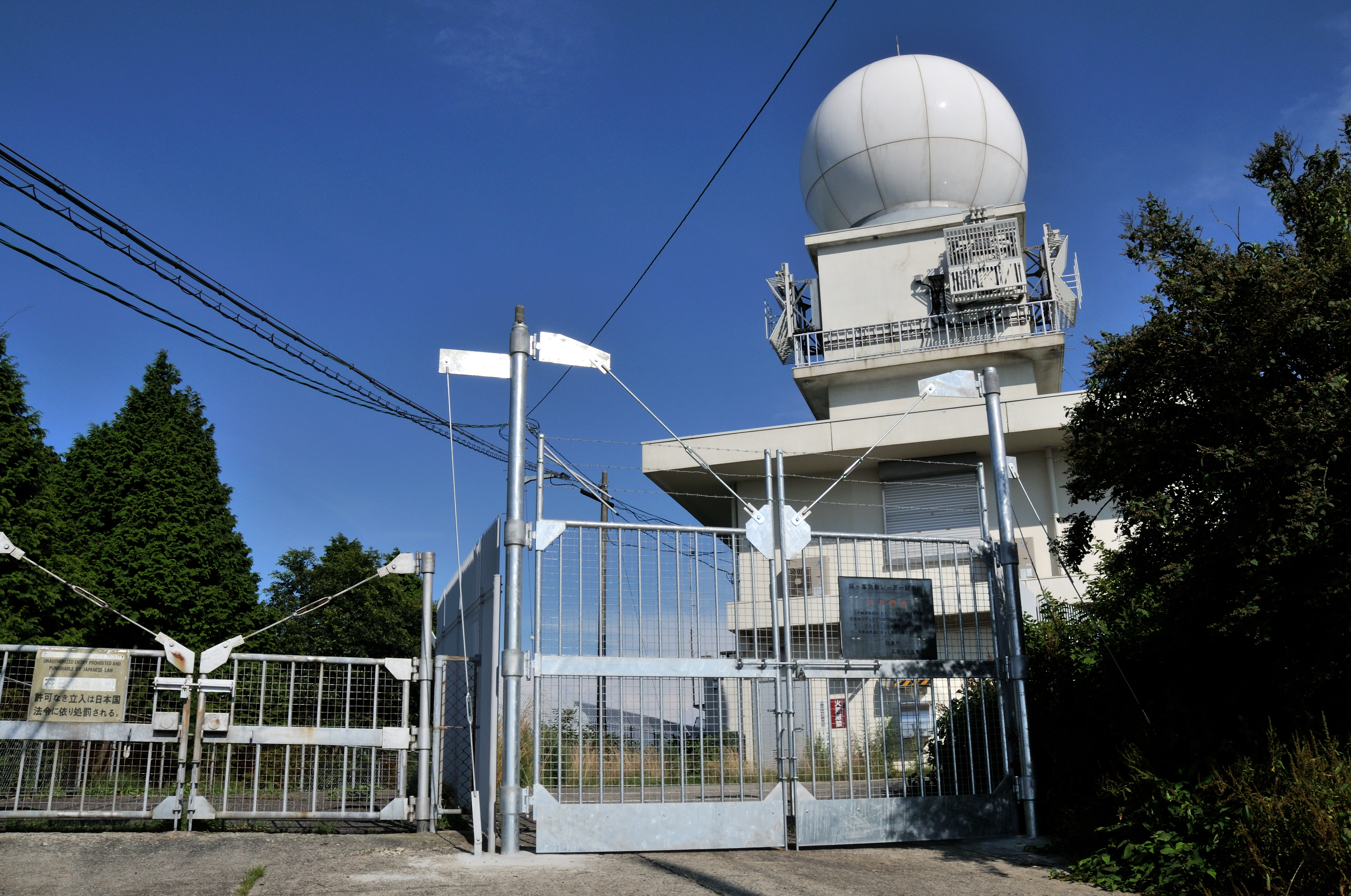 広島県呉市灰ヶ峰山頂にある、広島地方気象台 灰ヶ峯気象レーダーの写真です